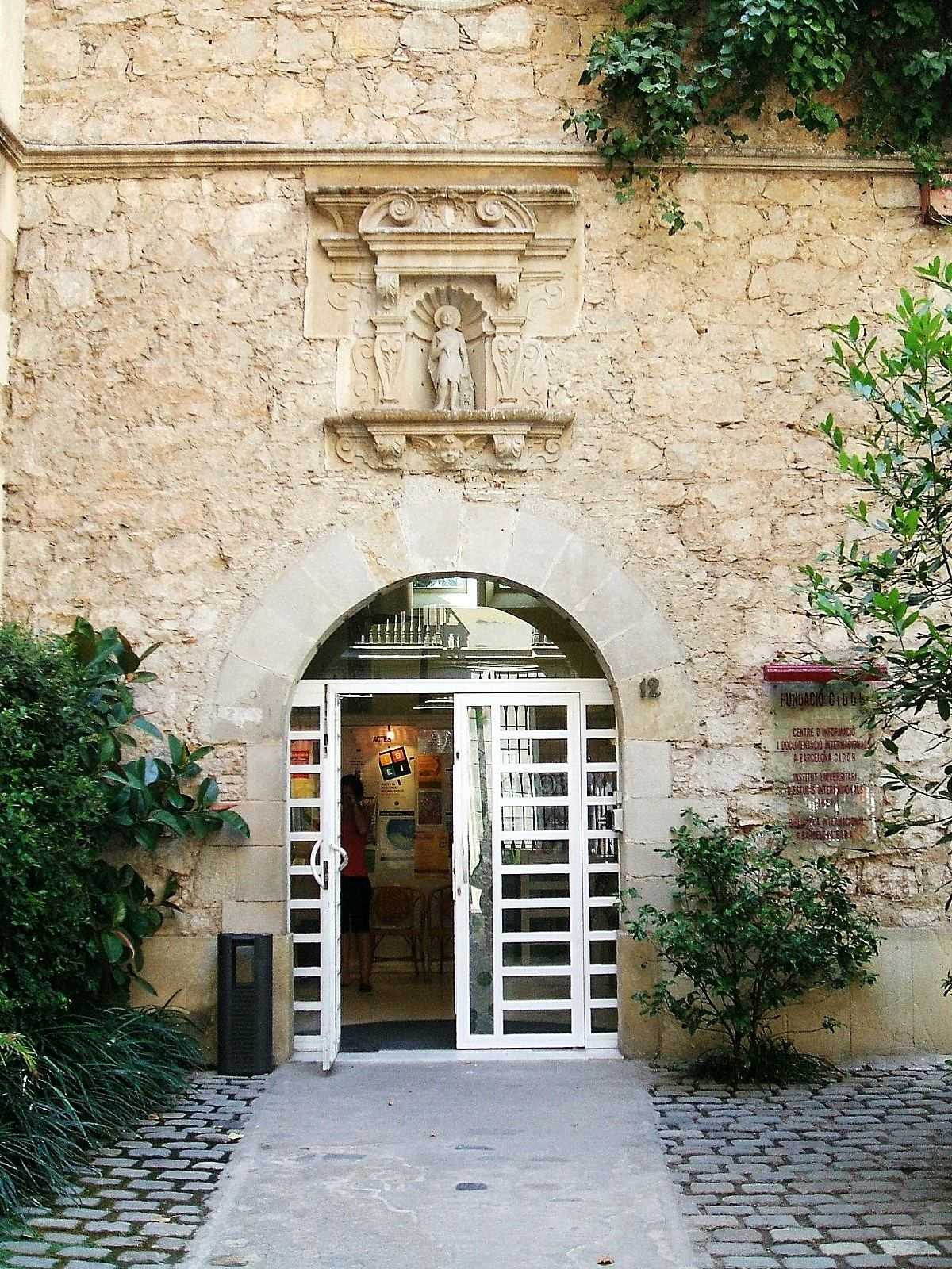 Porta de la Fundació CIDOB, a Barcelona